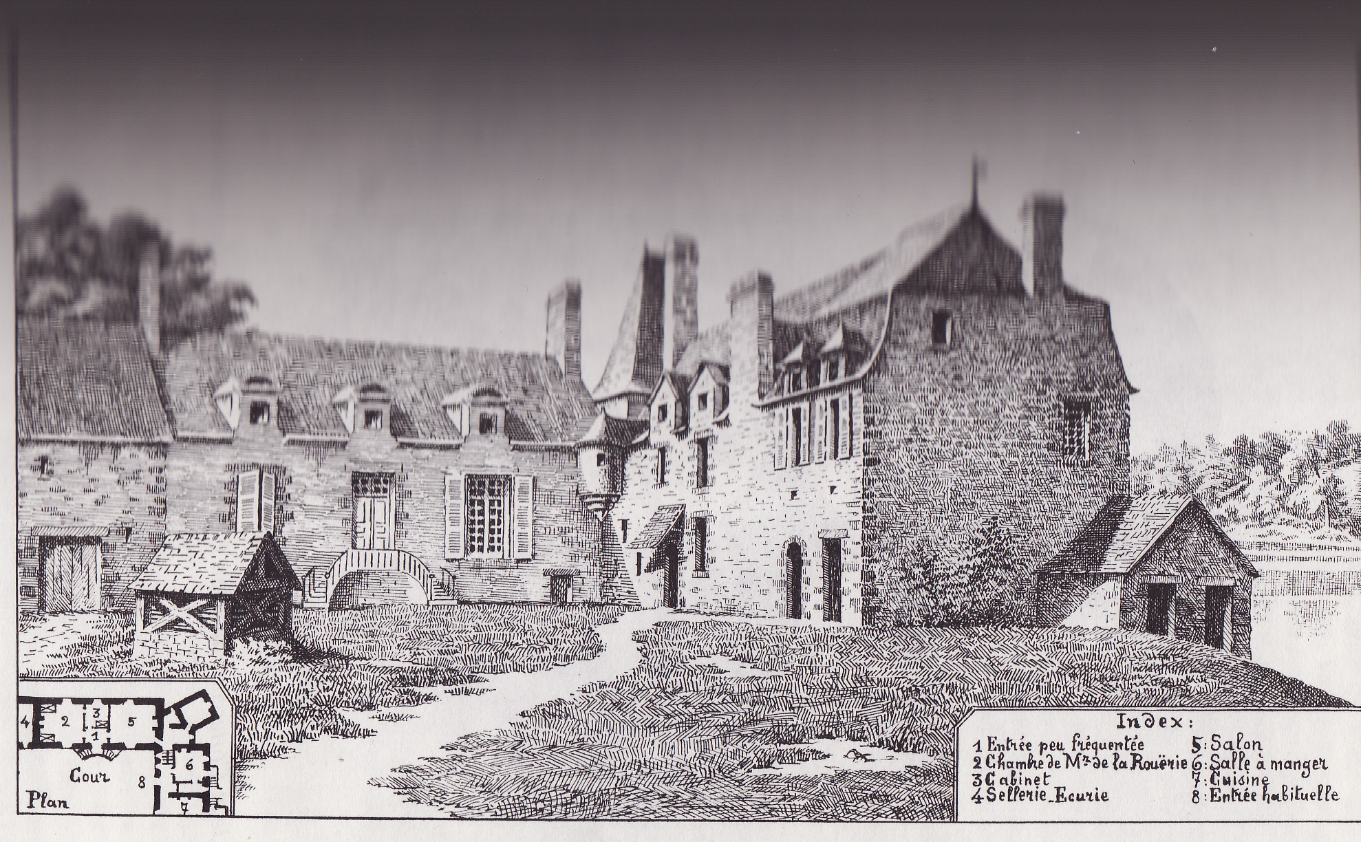 Château de Launay-Villiers en Mayenne au XVIIIe siècle